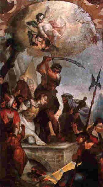 Sant' Antonino di Piacenza